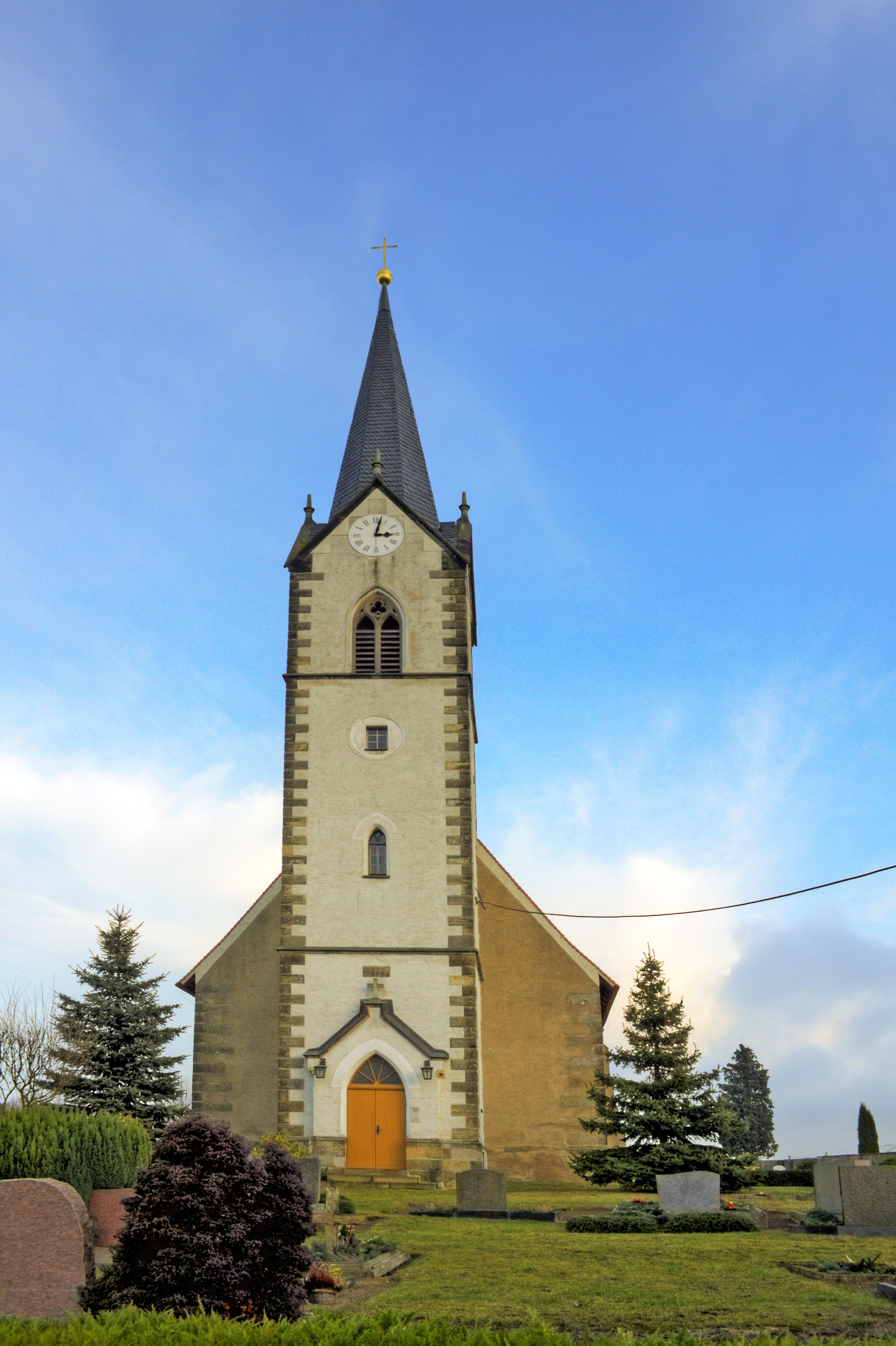 Kirche St. Marien in Sitzenroda